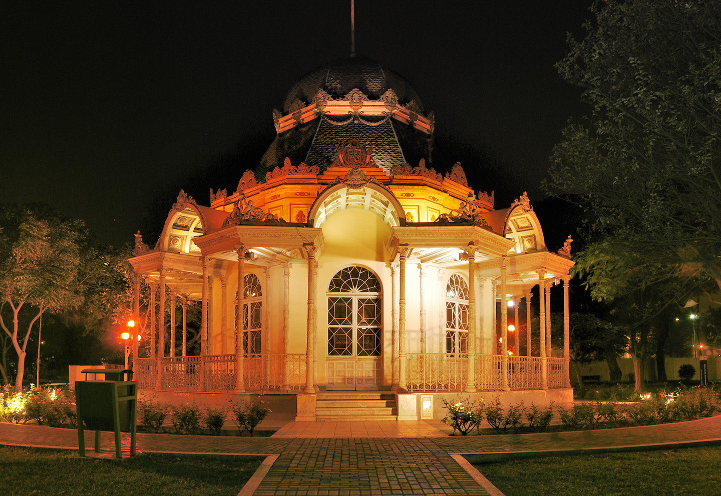 Pabellon Bizantino